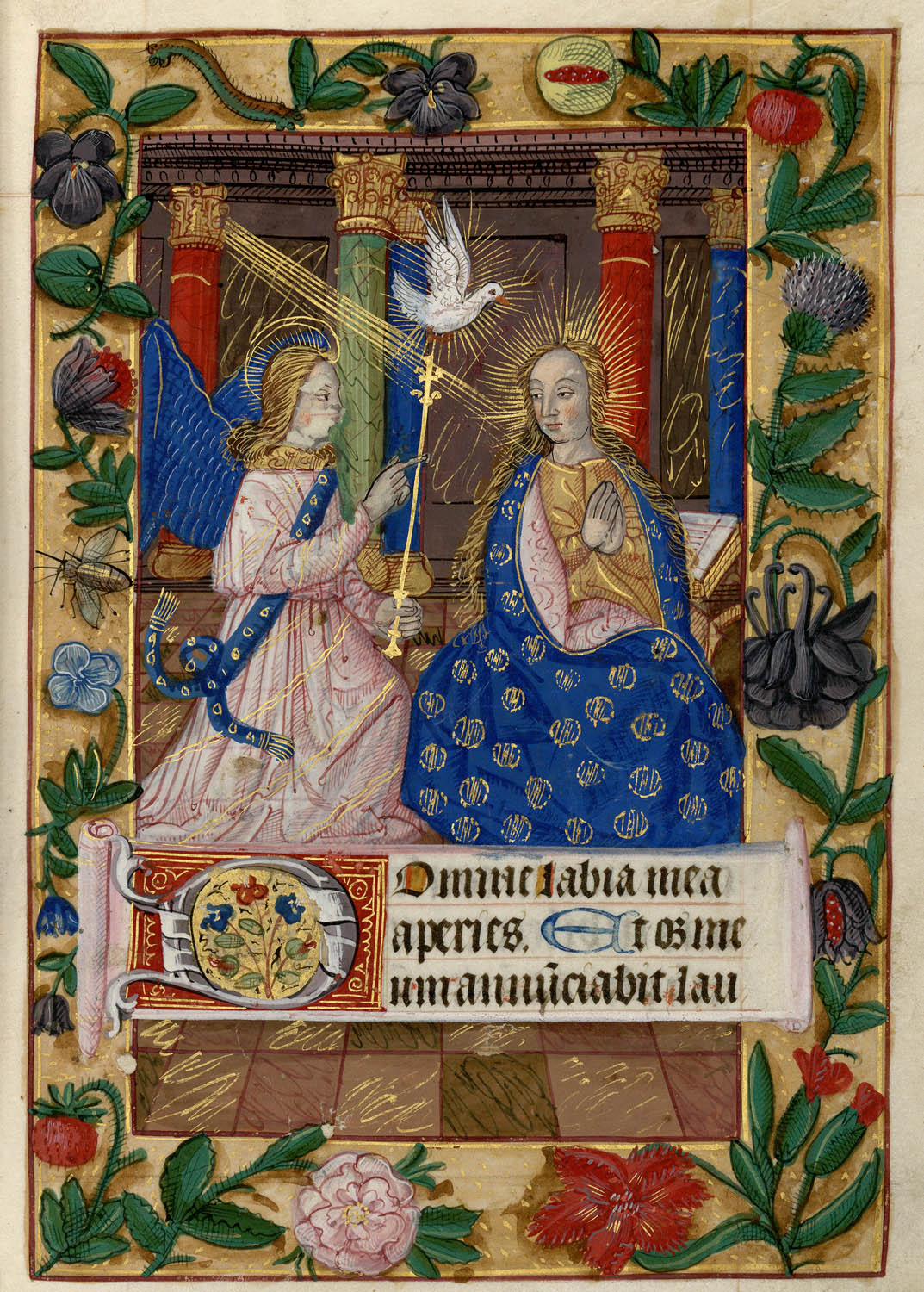 L'Annonciation. Notes : Célèbre scène biblique, avec l'archange Gabriel qui annonce à Marie, sa maternité divine. On aperçoit une petite colombe, symbole allégorique du Saint Esprit... Heures de Notre-Dame de Pitié (XVe siècle). Bibliothèque-médiathèque de Nancy, Manuscrit 305 (fol. 54). Plus de détails sur